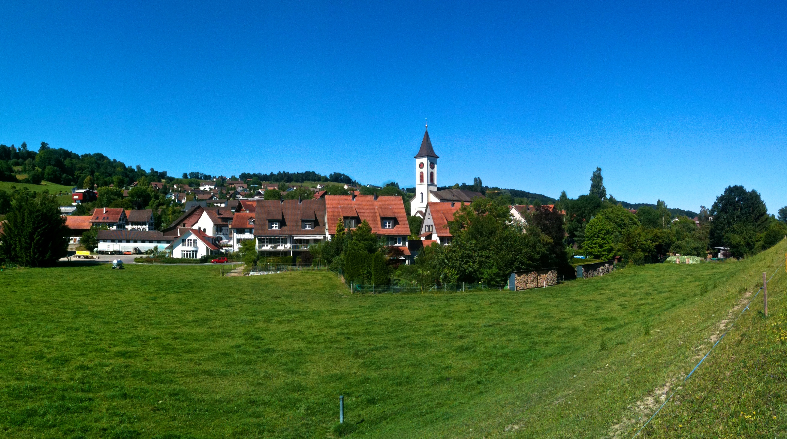 Uesslingen Buch